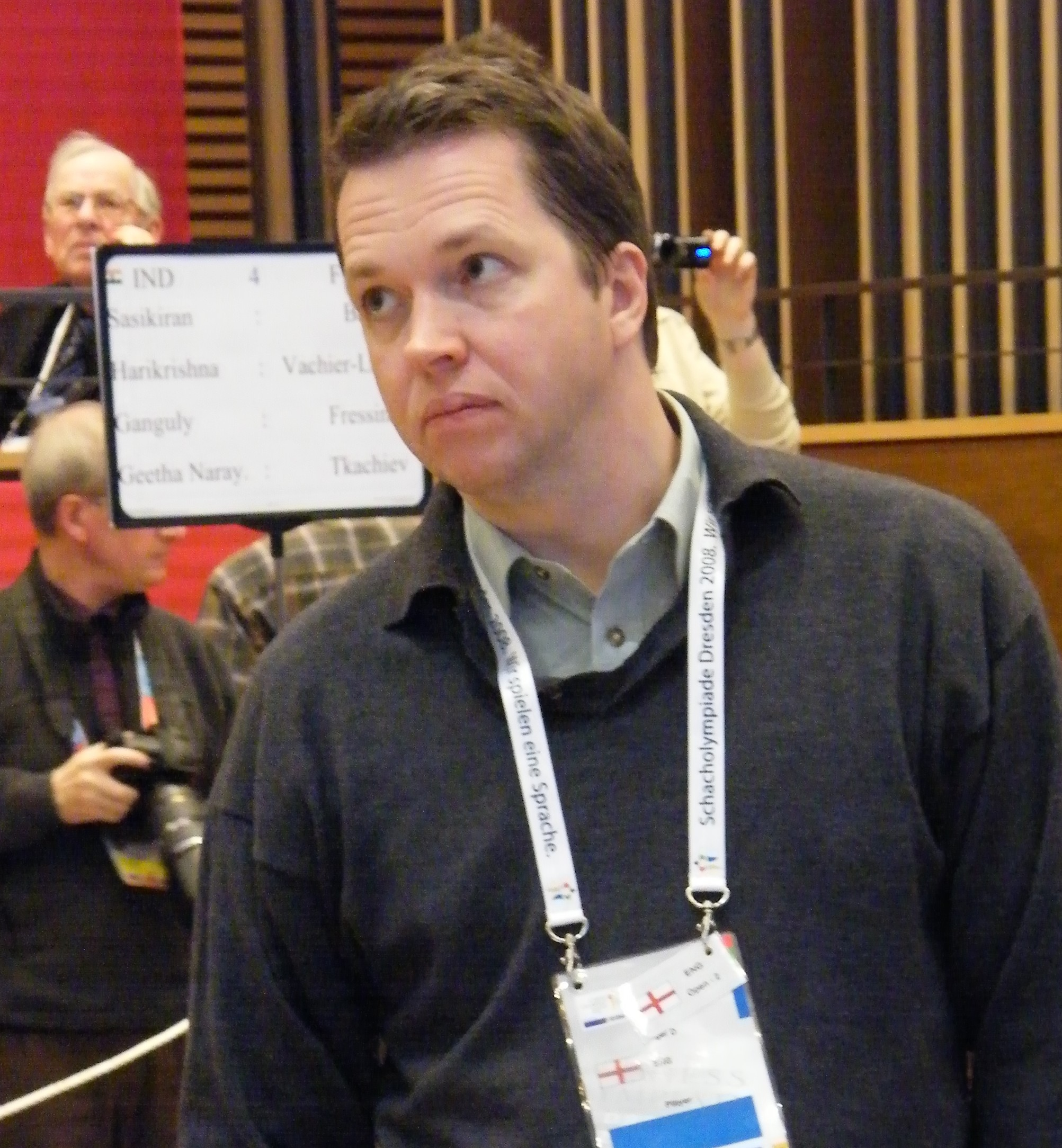 Nigel Short kiebitzt bei der 38. Schacholympiade in Dresden 2008